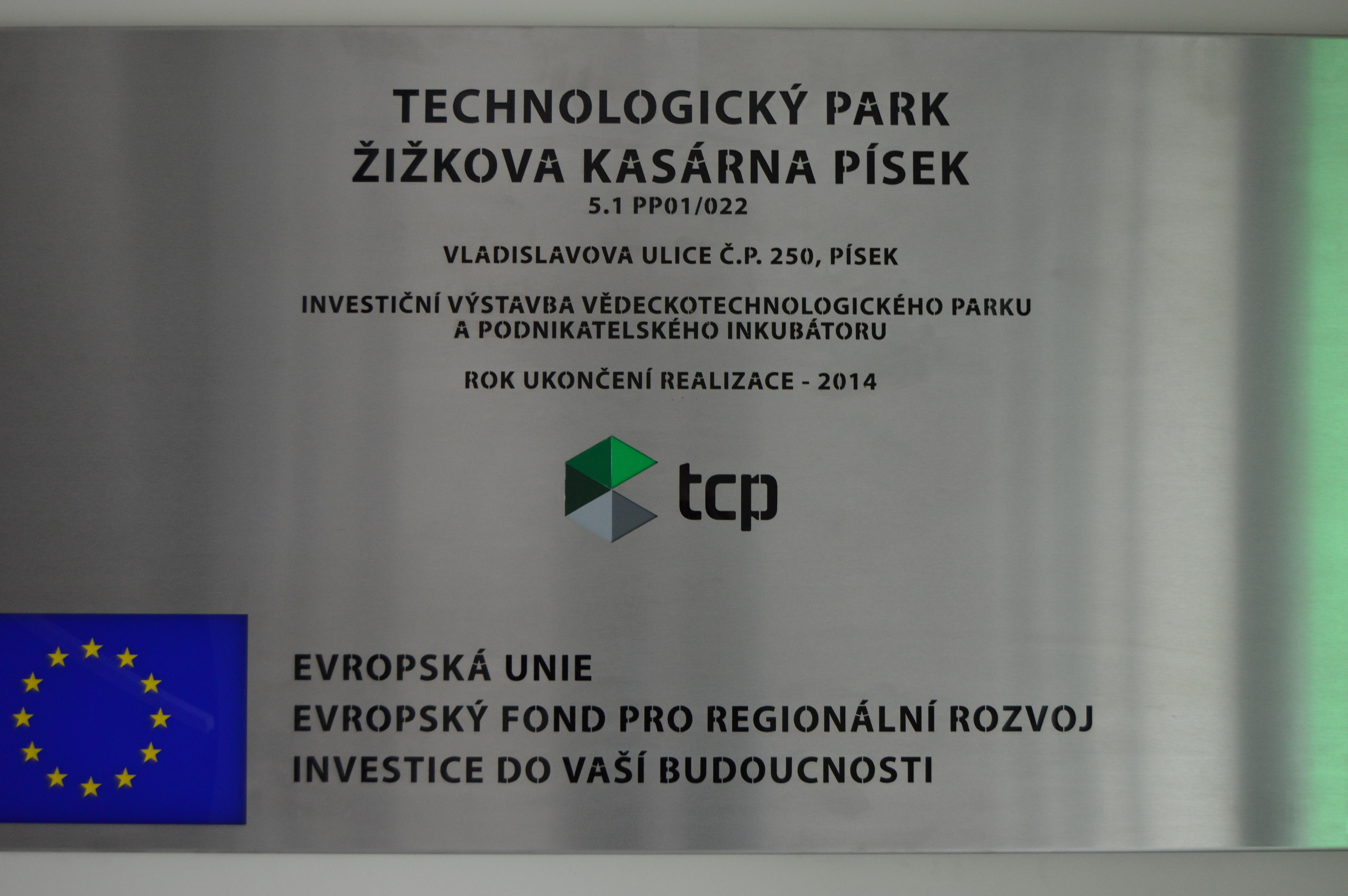 TCP projekt deska